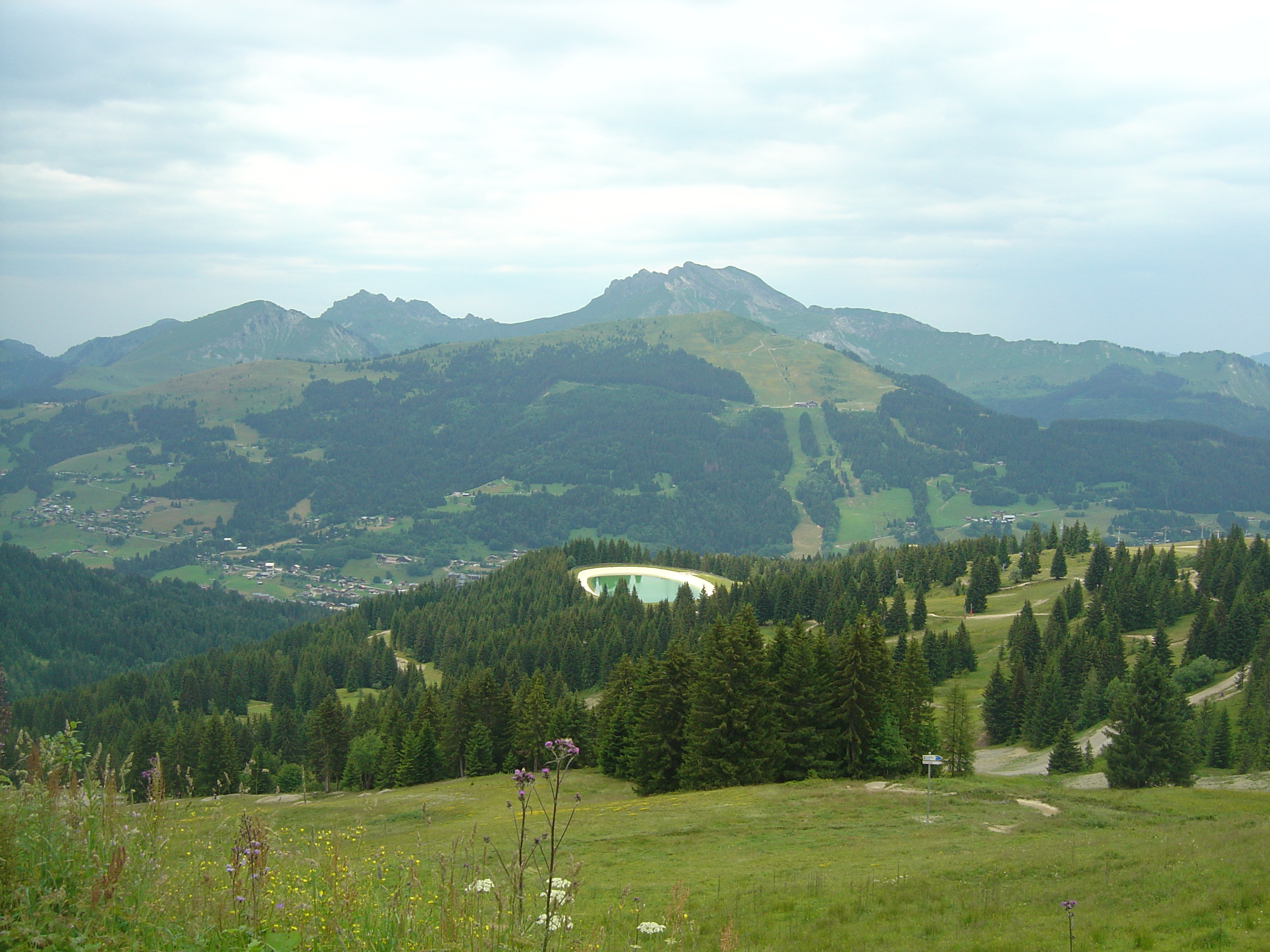 Ascension du col de Joux Plane par le versant nord au départ de Morzine (74). Vue depuis le col de Ranfolly vers le nord